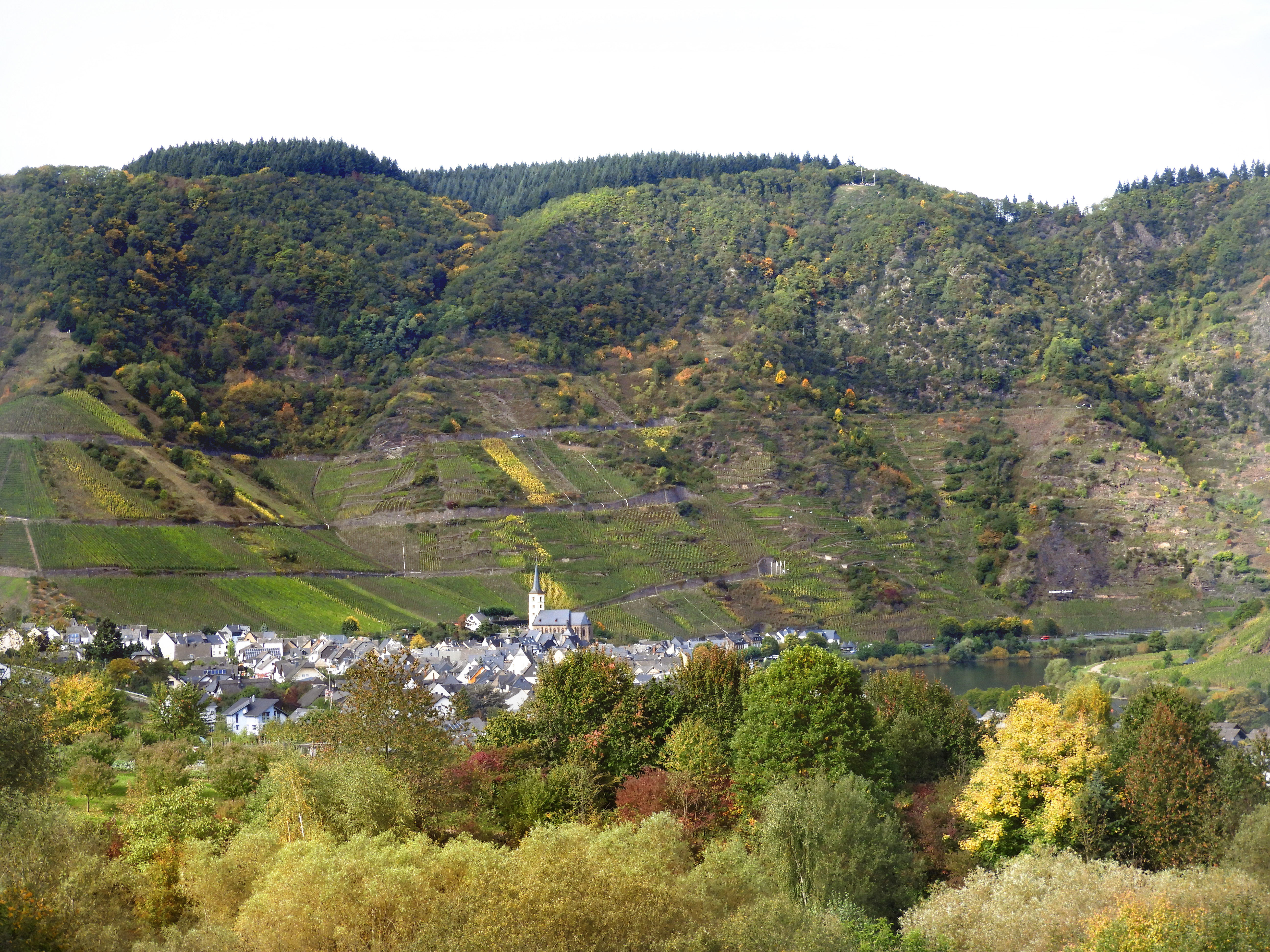 Bremm und der Calmont. Der Bremmer Calmont, zwischen Bremm und Ediger-Eller im Landkreis Cochem-Zell, gilt wegen seiner Hangneigungen mit bis über 65 Grad als steilster Weinberg Europas. Der Calmont liegt im Landschaftsschutzgebiet "Moselgebiet von Schweich bis Koblenz" mit dem CDDA-Code 323051, im Vogelschutzgebiet 5908-401 "Wälder zwischen Wittlich und Cochem" und im FFH-Gebiet 5809-301 "Moselhänge und Nebentäler der unteren Mosel". Die Grenzen des FFH-Gebietes und des Vogelschutzgebietes reichen nicht ganz bis an die Mosel.